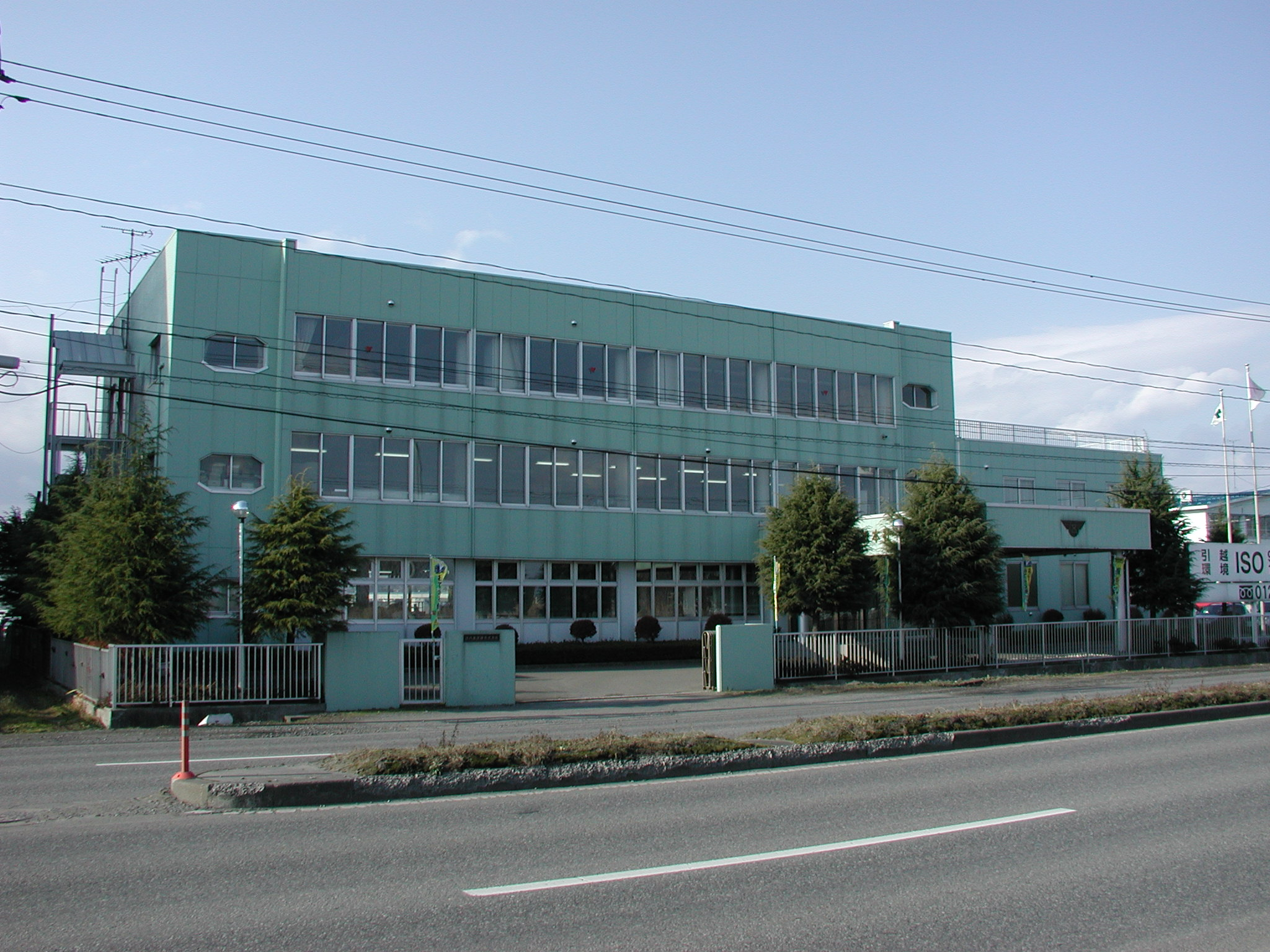 三八五流通：総本社